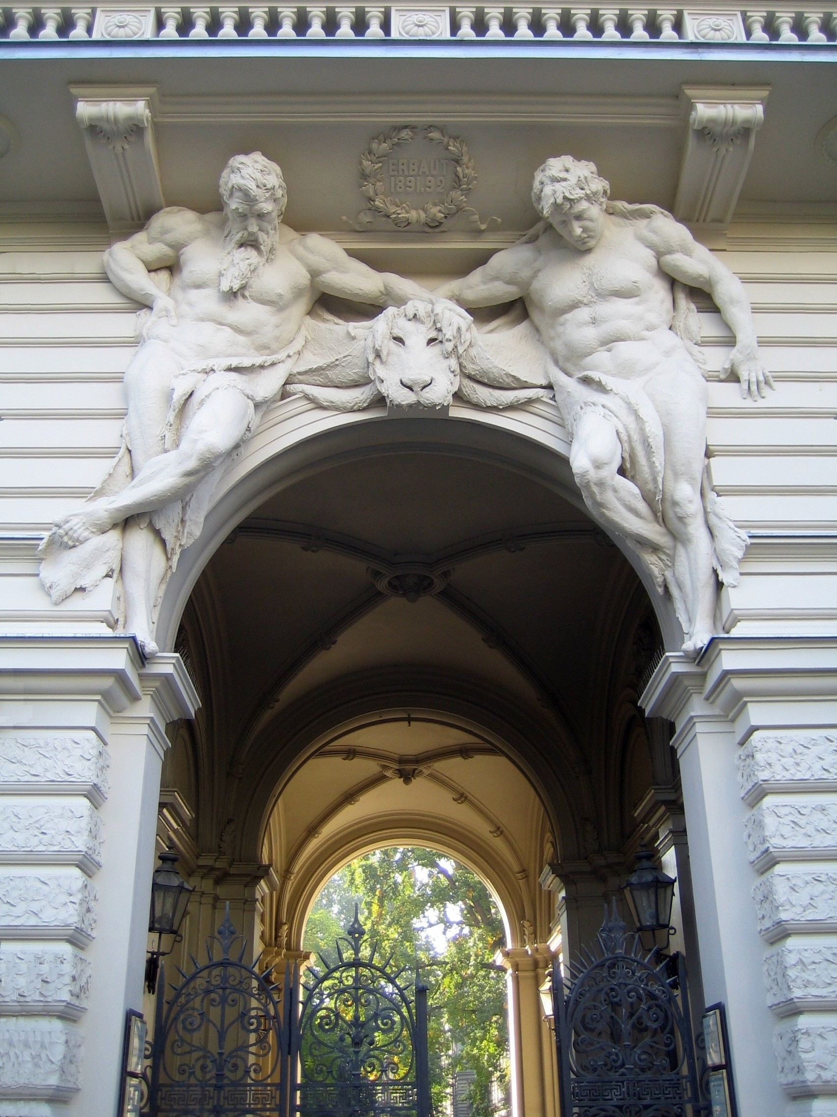 Stuckdekoration am Eingang eines Mietshauses in Berlin-Kreuzberg; 1891/92.